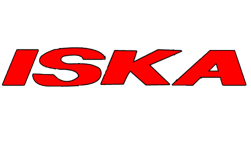 ISKA.jpg